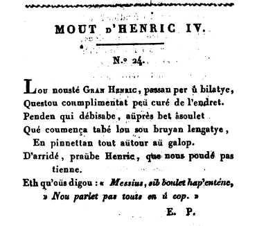 Poème de l'écrivain béarnais occitan Eusèbe Picot